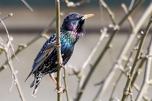 Star (Sturnus vulgaris)